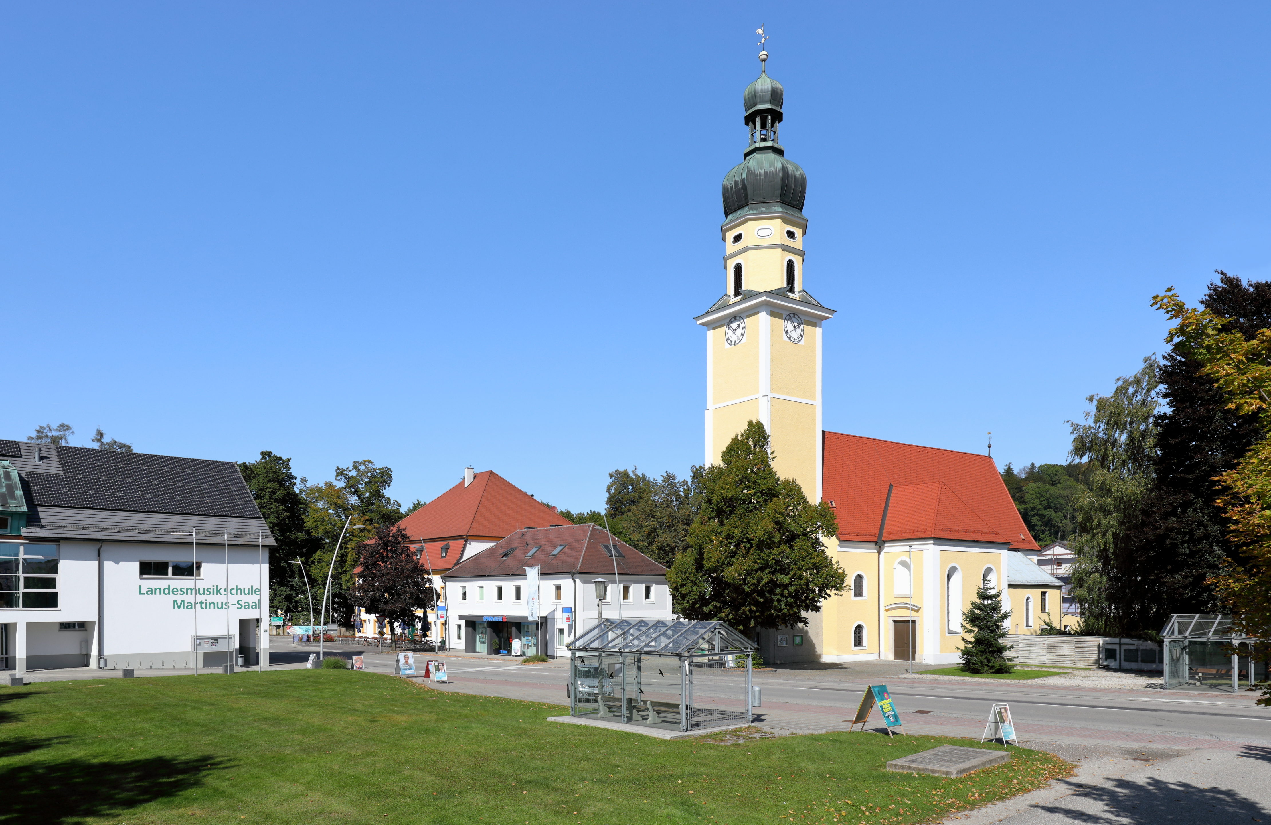 Die röm.-kath. Pfarrkirche hl. Martin und Vorplatz in Diesseits, Hauptort der oberösterreichischen Marktgemeinde St. Martin im Innkreis.Der ursprünglich gotische Sakralbau wurde 1781 von Ignaz Prechtler im barocken Stil umgebaut. Der vorgestellte Westturm wurde laut Inschrift 1594 errichtet und 1714 mit einem achtseitigen Aufsatz sowie einem Zwiebelhelm mit Laterne erhöht.